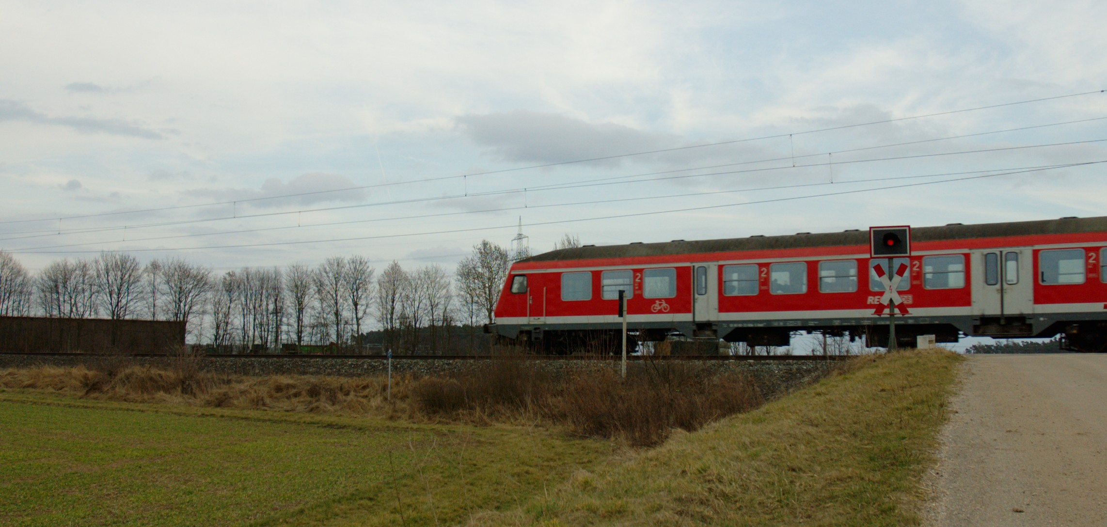 Bahnübergang Gottmannsdorf